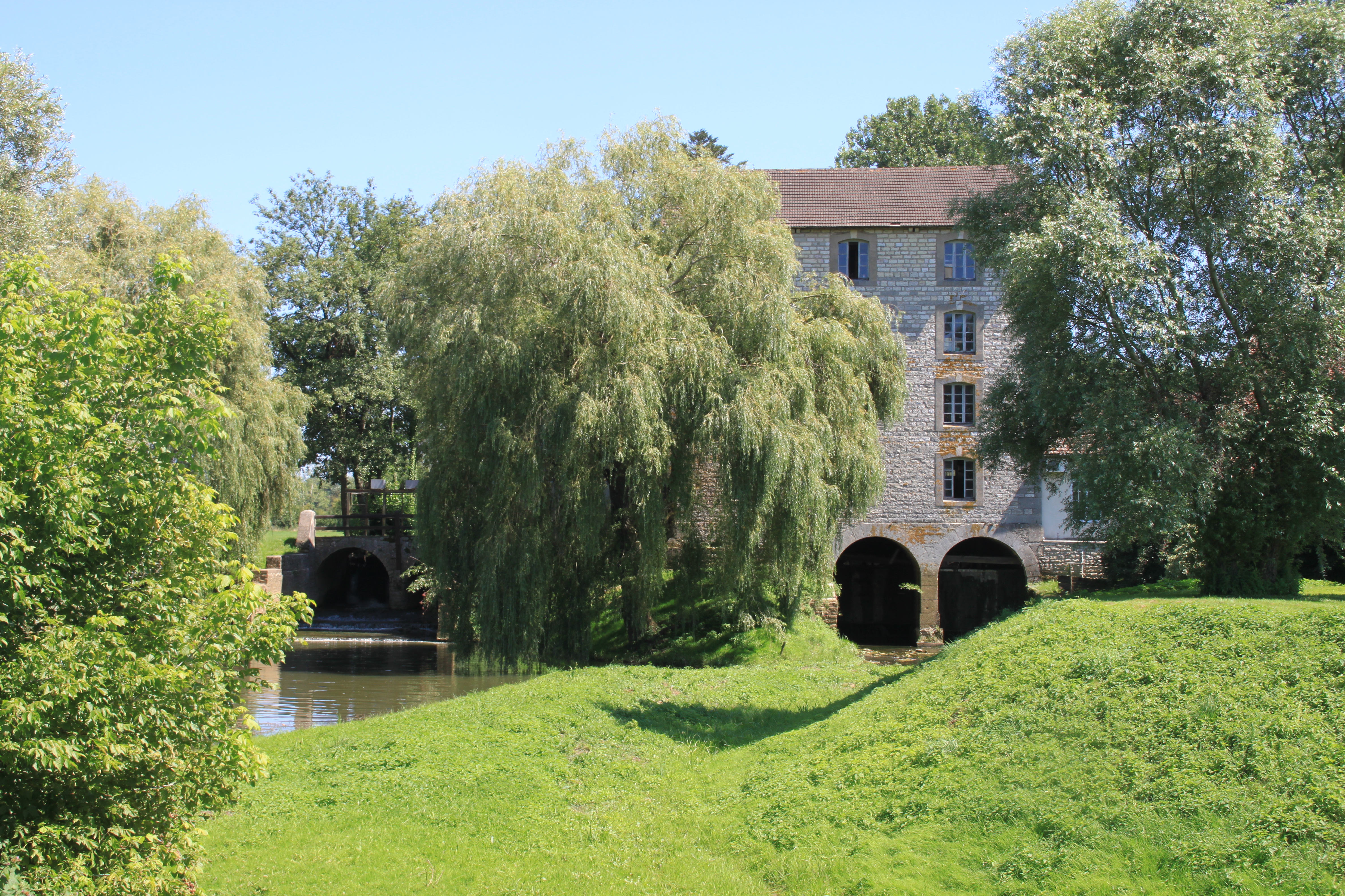 Torpes (Saône-et-Loire) Mühle Lambey